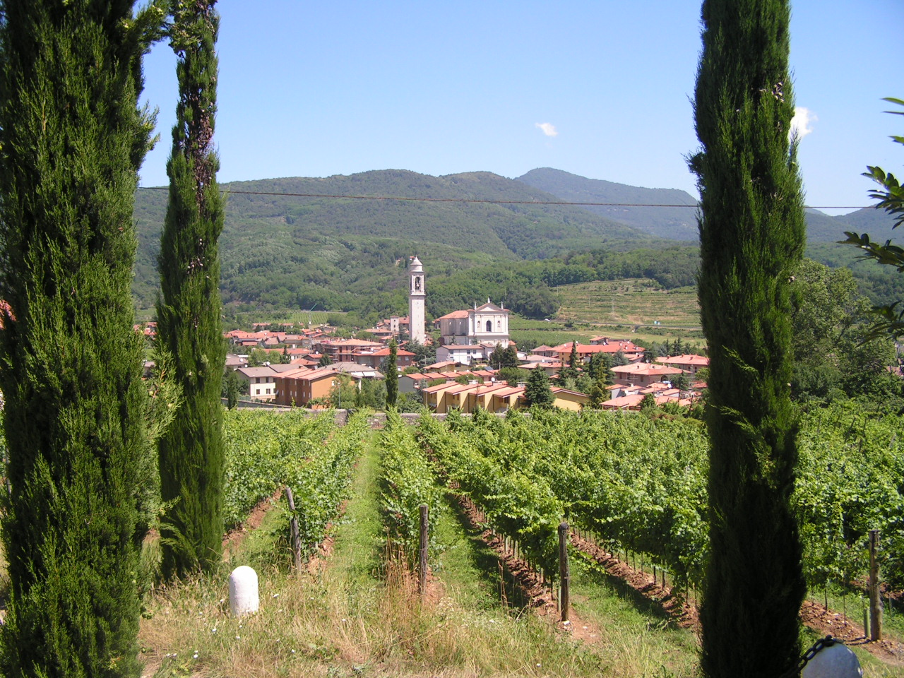 Vista di Provezze, frazione di Provaglio d'Iseo. Al centro la chiesa parrocchiale di San Filastrio